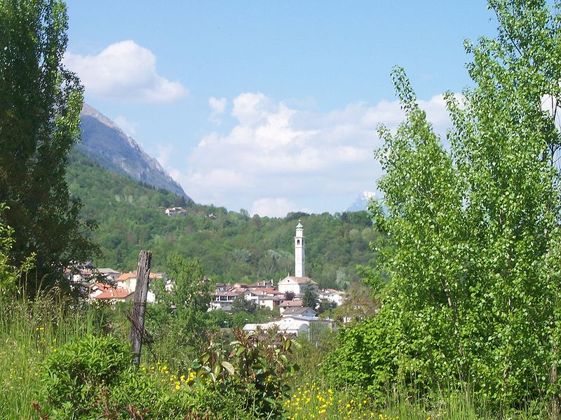 Cesiomaggiore vista da Cesio Minore Vèneto: Žess vist da Žessmenor